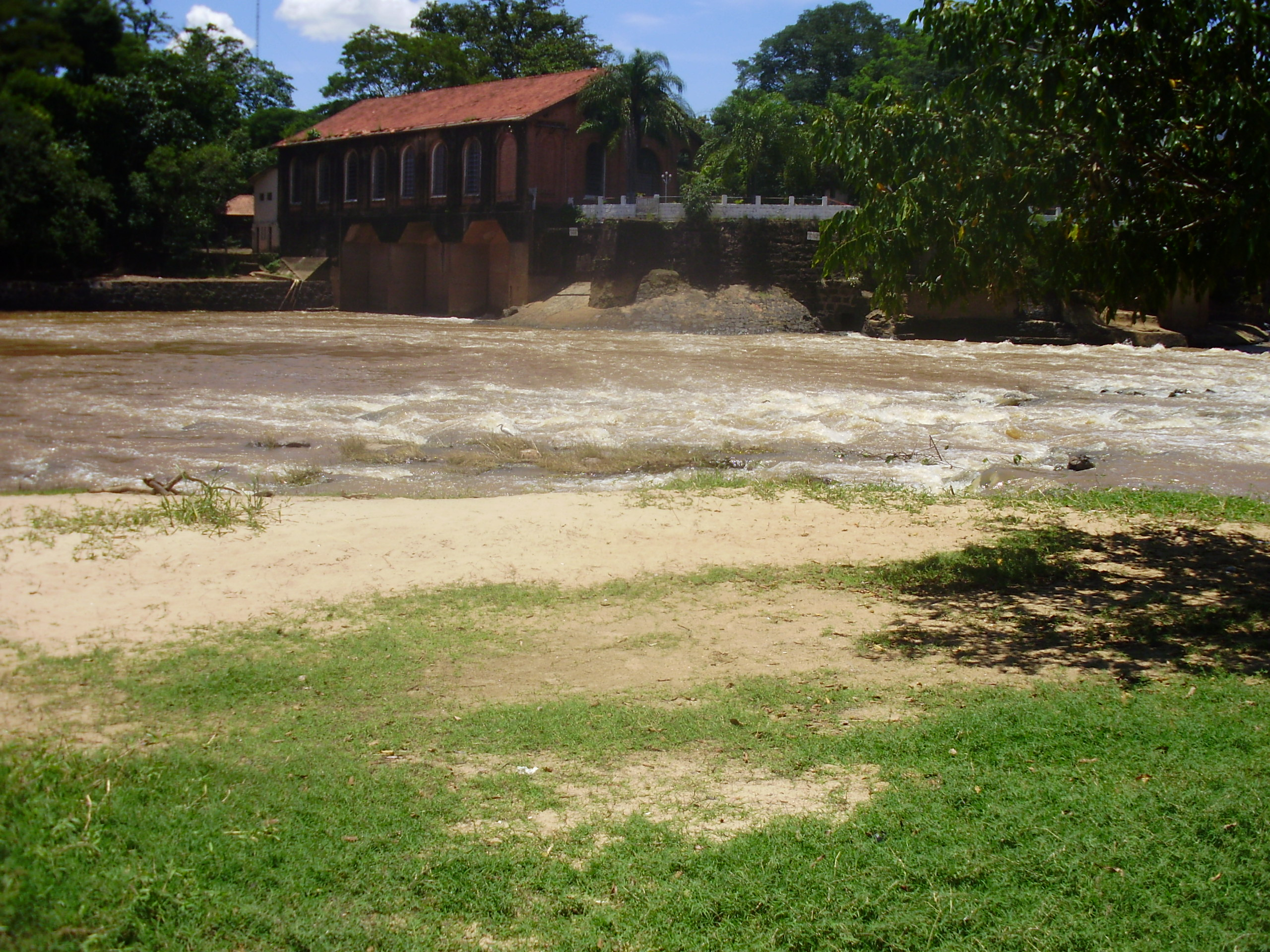 Vista do Ecomuseu da Cachoeira de Emas.